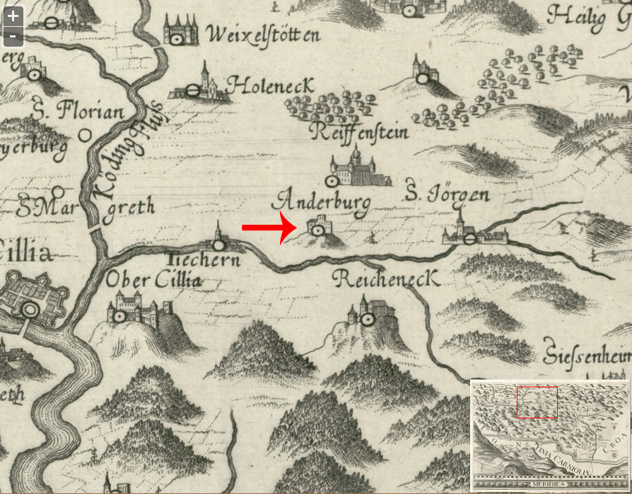 Grad Anderburg na zemljevidu iz leta 1678, avtor: Vischer, Georg Matthaeus, 1628-1696